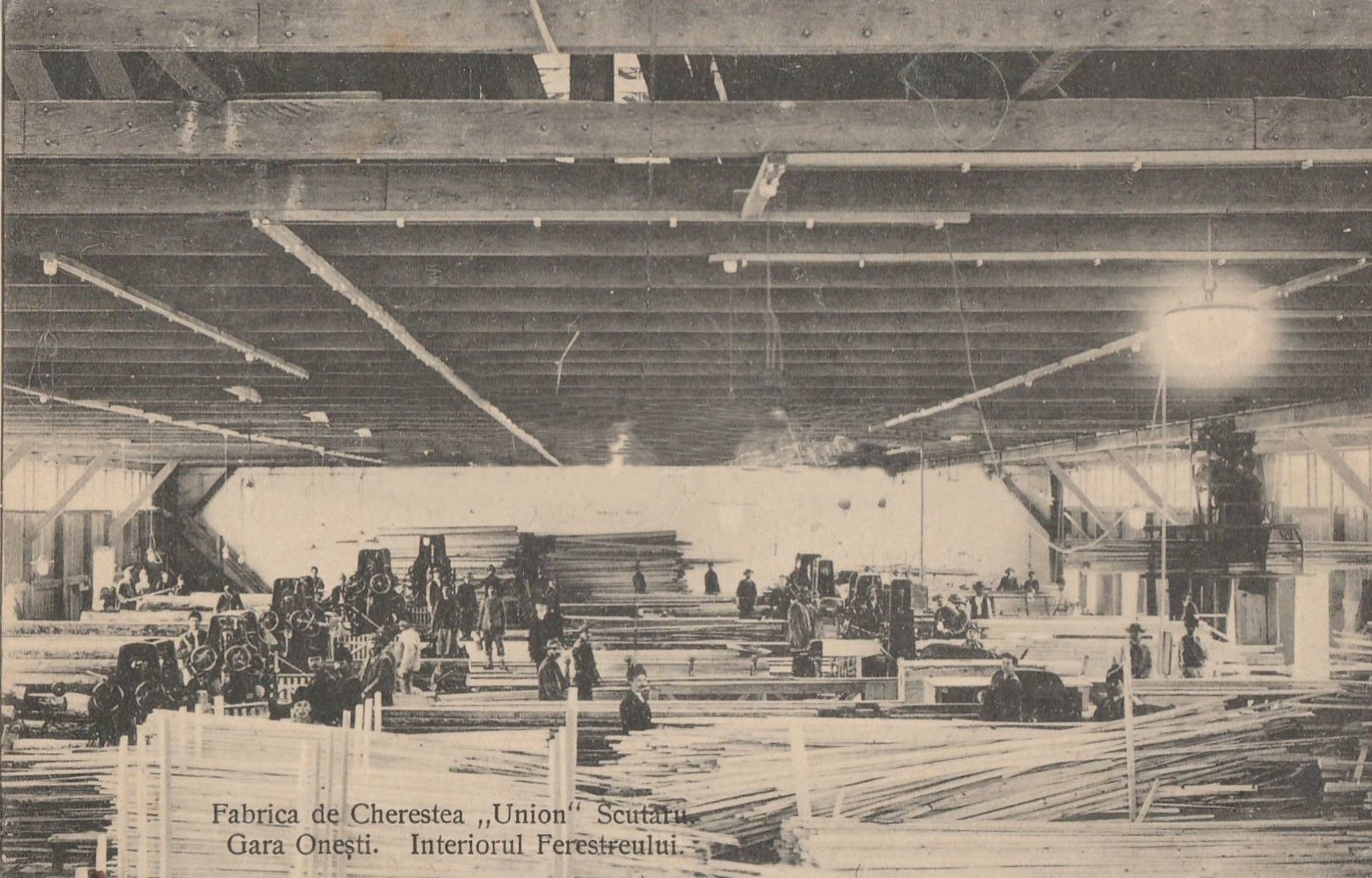 Fabrica de Cherestea „Union” Scutaru, Gara Onești, interiorul secției ferăstrăului (circa 1925 - bazat pe timbrul de pe verson tipărit în 1919, decesul lui Ferdinand I în 1927 și ștampila poștei, al cărui an se sfârșește cu 5)